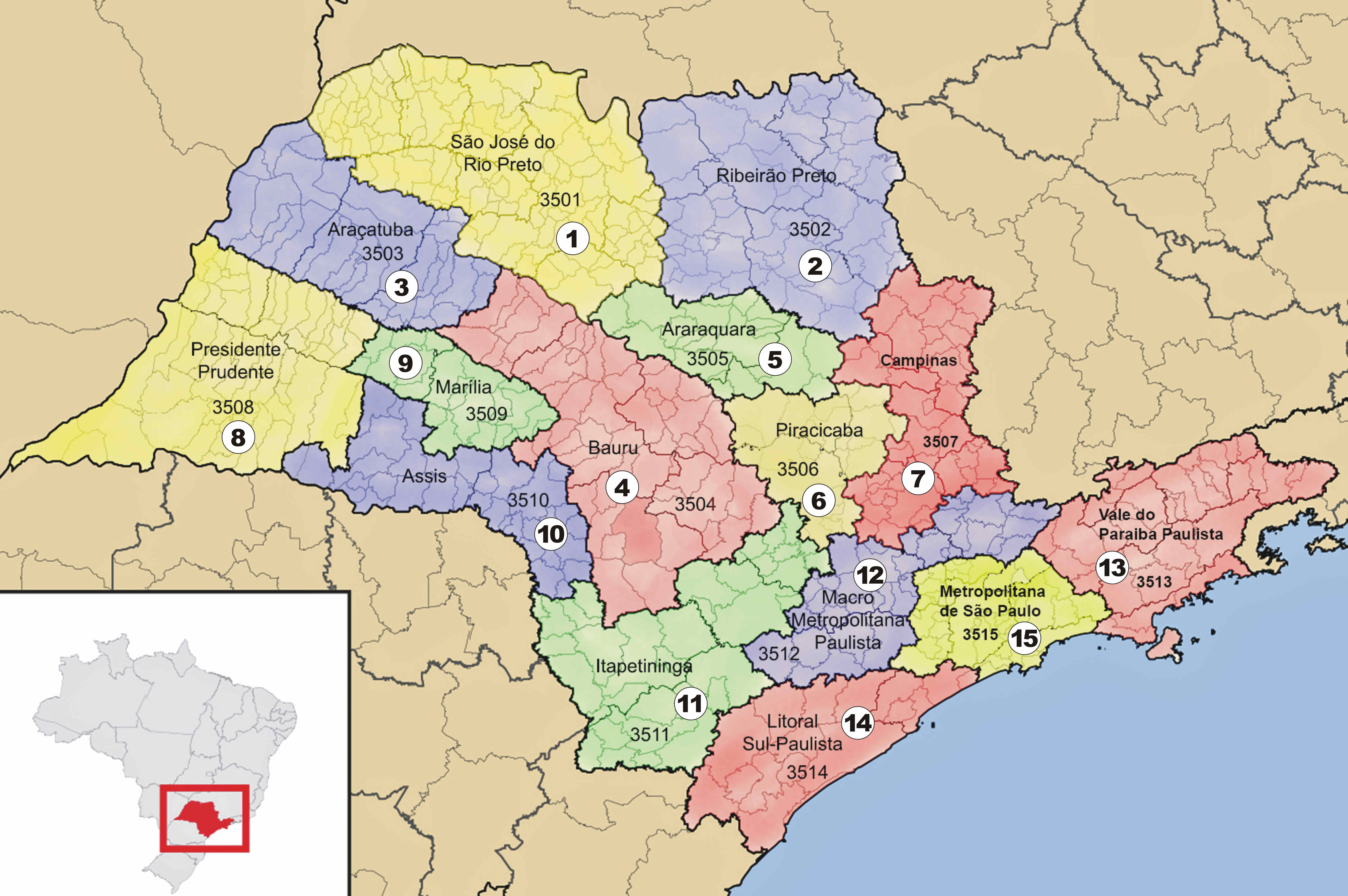 Map Mesoregiões in São Paulo